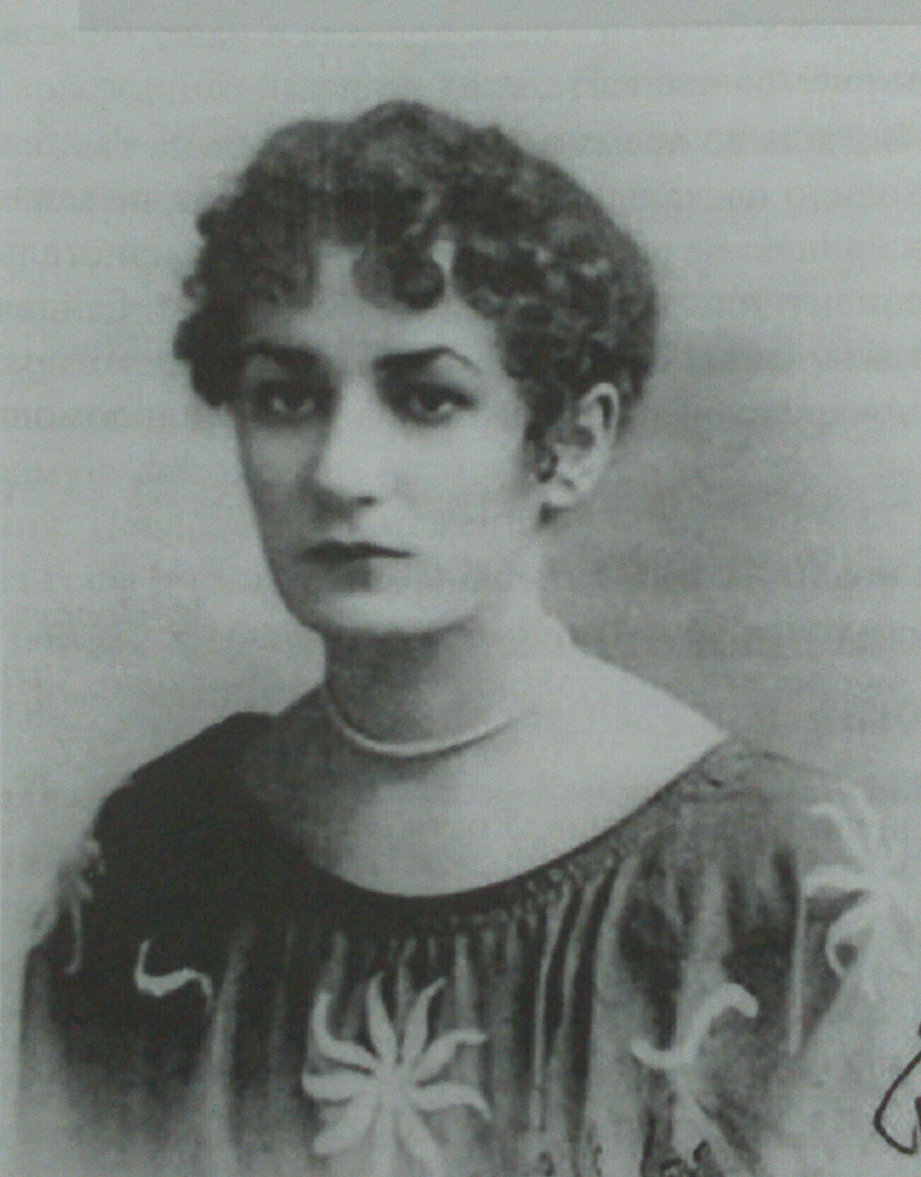 Марченко Ганна (нар.10.6.1899, с. Вірівка Бахмутського повіту Катеринославської губернії — 1944) — інженер-економіст, акторка, Урядовець Міністерства преси, службовець Міністерства внутрішніх справ (до 1920), Міністерства народного господарства (до 1921) уряду УНР.